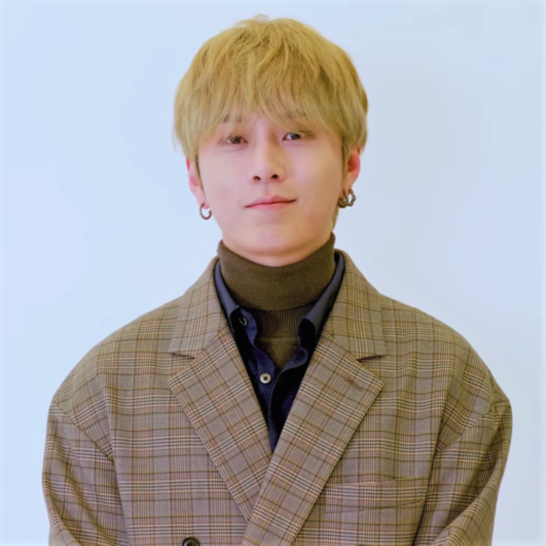 [Marie Claire Korea] #마리미니토크 하이라이트 용준형